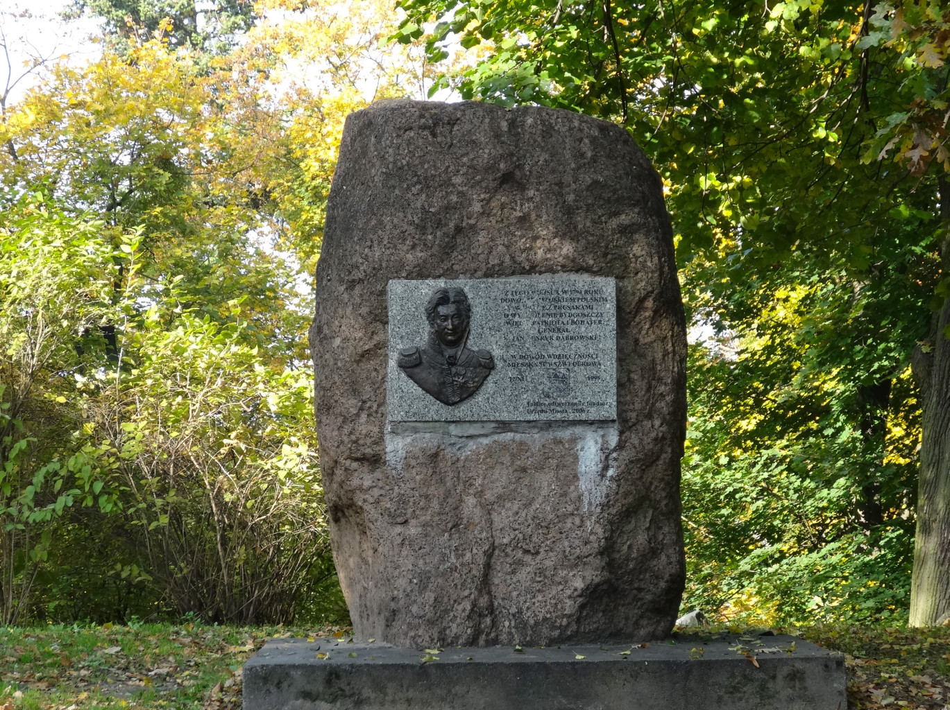 Kamień pamiątkowy ku czci generała Henryka Dąbrowskiego, który 2 października 1794 r. odbił Bydgoszcz z rąk pruskich podczas insurekcji kosciuszkowskiej (autor Krystyna Panasik, 1999)